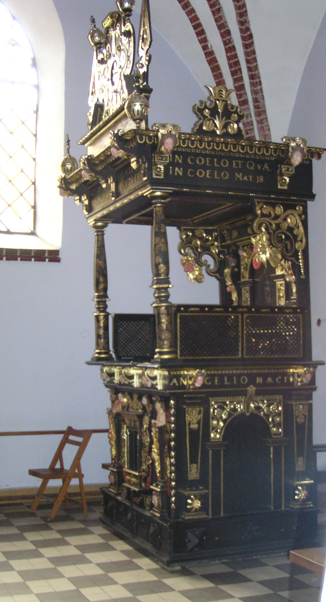 Fotografie von einem der beiden restaurierten Beichtstühle aus der Deutschen Kirche Tilsit in der Kirche Johannes Evangelist und Muttergottes von Tschenstochau in Bartoszyce; siehe auch 25. Tilsiter Rundbrief (1995/96), S. 82.